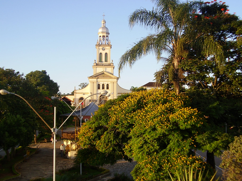 Pç. Capitão Maciel e Igreja Matriz de São Sebastião